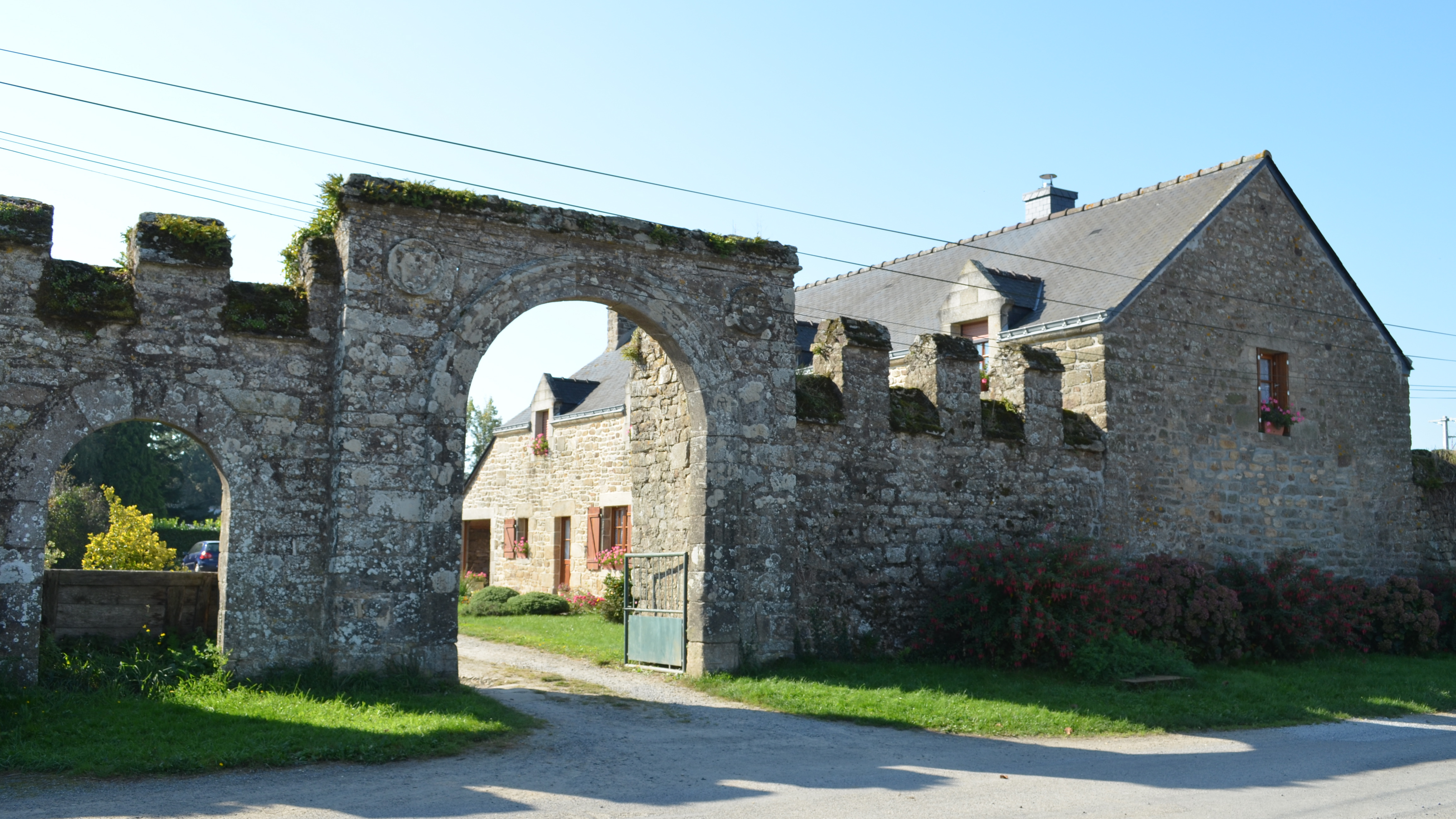 Entrée de l'ancien doyenné (XVe-XVIe siècles) - Péaule (Morbihan) .